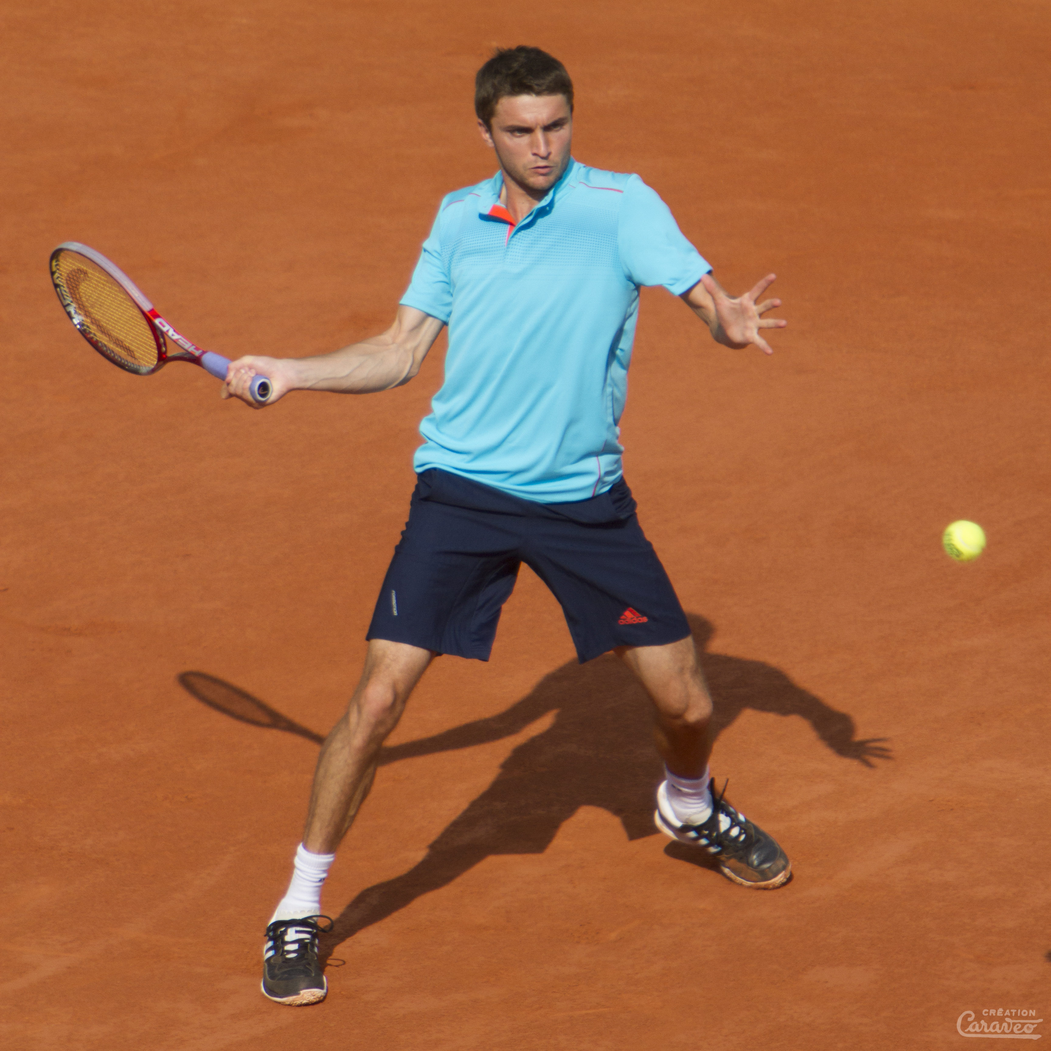 Gilles Simon, Roland-Garros 2012.